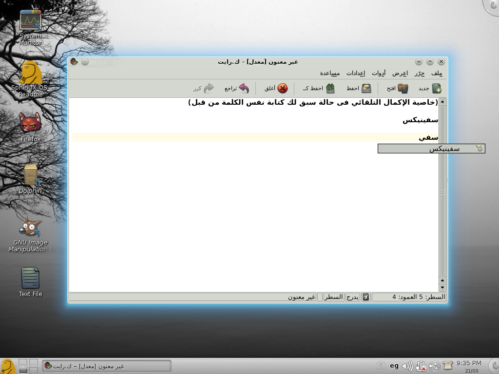 خاصية اﻹكمال التلقائي في اﻹصدار 4.8.3 من برنامج الكاتب ك على نظام التشغيل سفينيكس